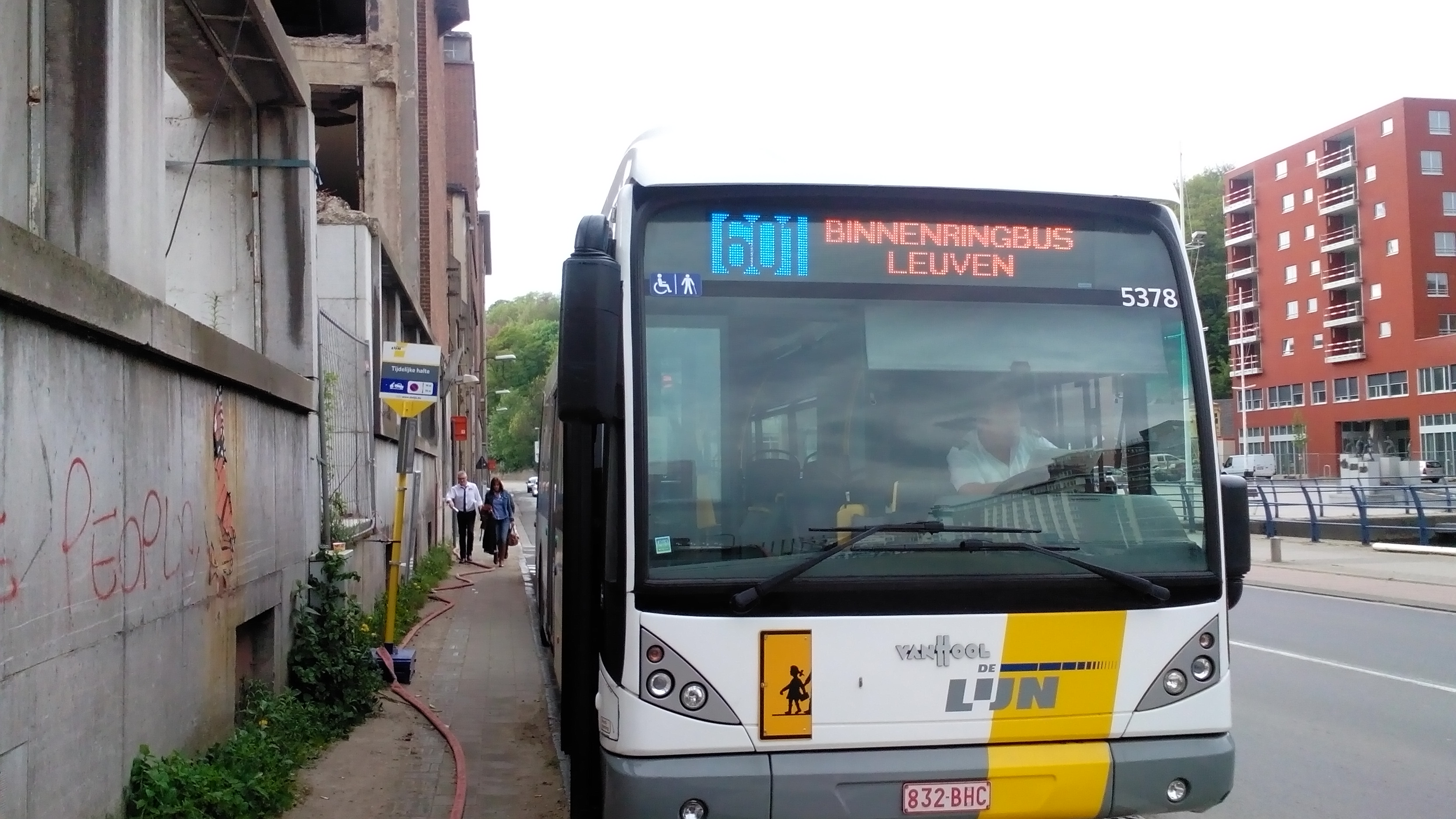 Binnenringbus 601 Leuven Vaartkom De Lijn op de eerste dag dat hij reed. De positie van deze halte is tijdelijk.